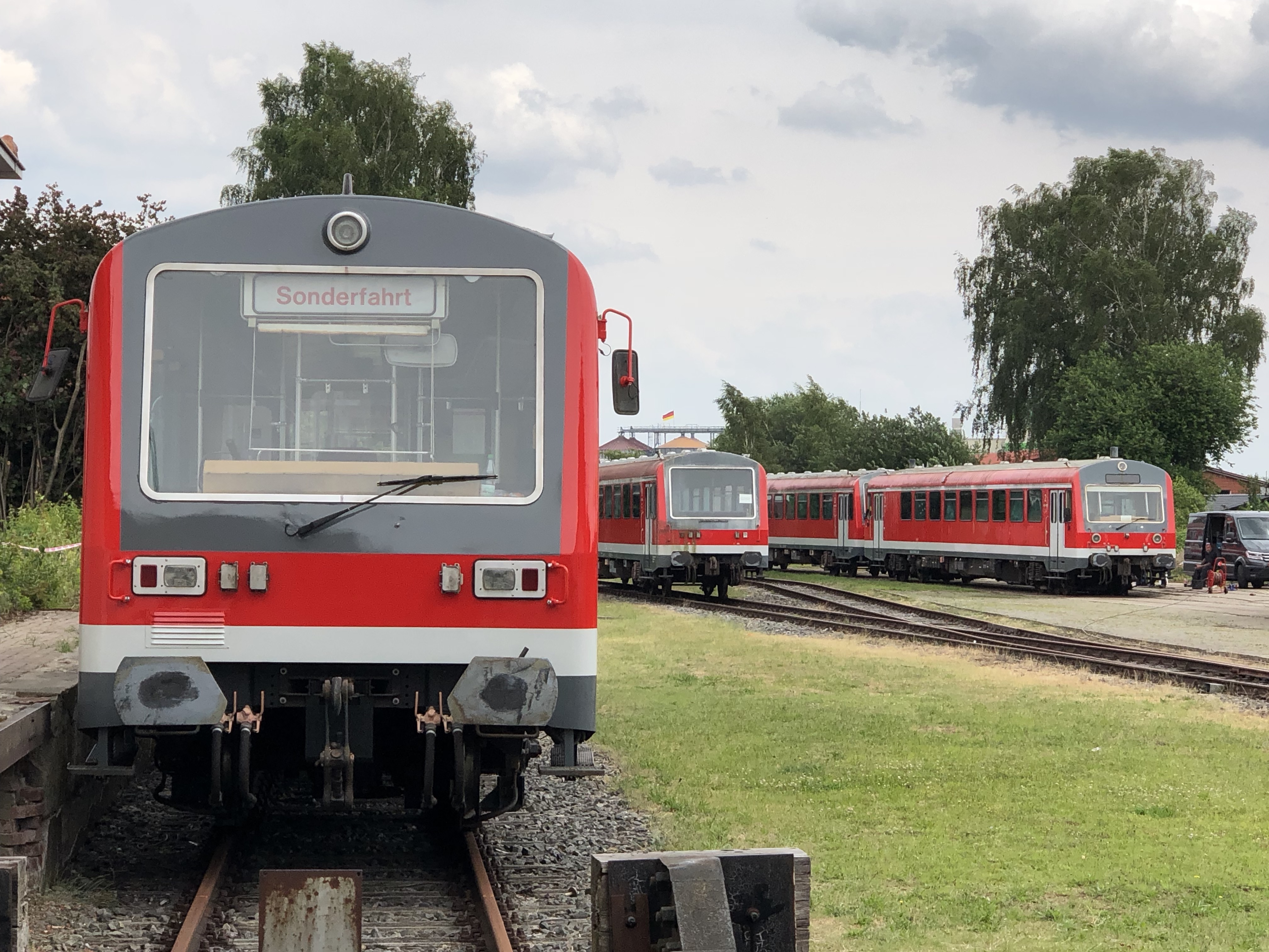 VT81 links, VS183 mittig, VS184, VT82 rechts